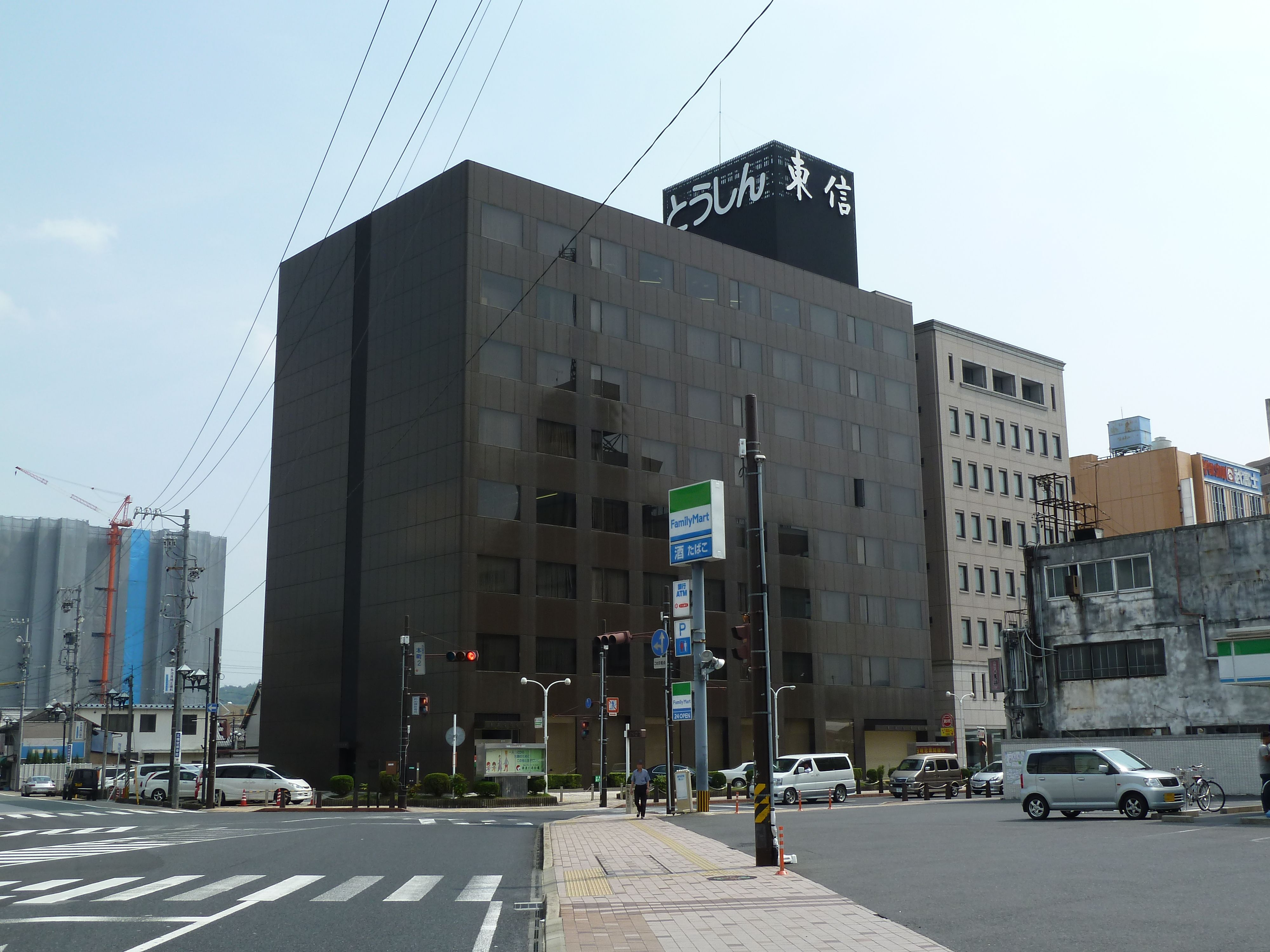 多治見駅前にある東濃信用金庫本店